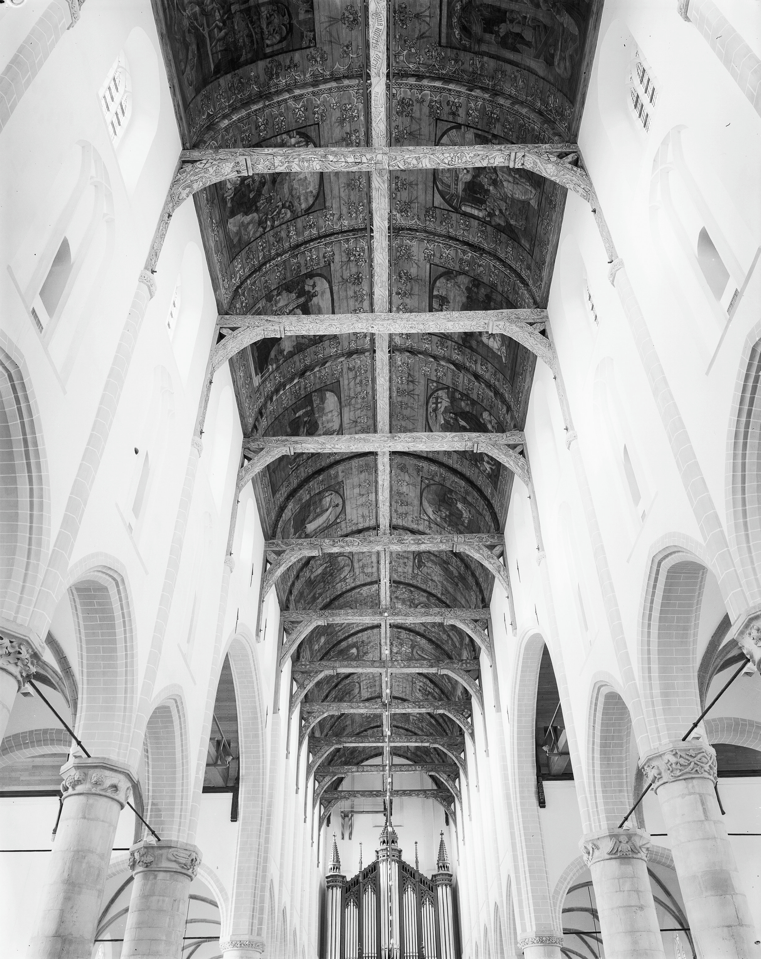 Nederlands Hervormde Grote Kerk (Sint Vituskerk): gewelf, overzicht vanuit het koor